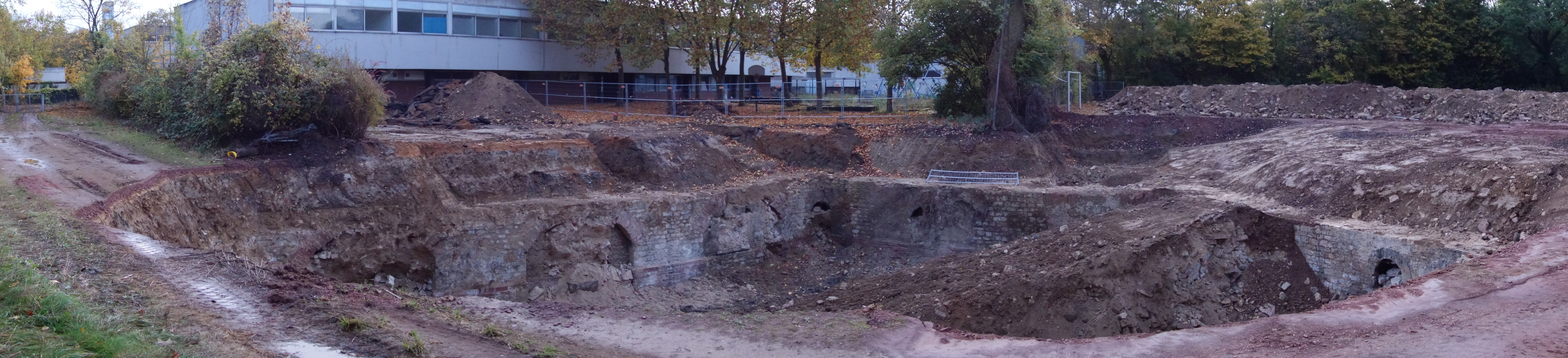 Verzerrte Panoramaaufnahme der Ausgrabungen: der links und rechts zu sehende rötliche Fahrweg verläuft nahezu gerade. Links das alte Schulgebäude, das 2018 abgerissen wurde. Vor der rechten Hälfte des Schulgebäudes steht eine Gruppe von ca. 8 höheren Bäumen, die trotz der geplanten Umwandlung des gesamten Areals in ein Wohngebiet erhalten bleiben sollen und sowohl in späteren Ausgrabungsphasen als auch in Zukunft eine örtliche Orientierung ermöglichen. Rechts neben den Bäumen ist das südliche Tor des großen Asche-Fußballplatzes der Schule zu erkennen.